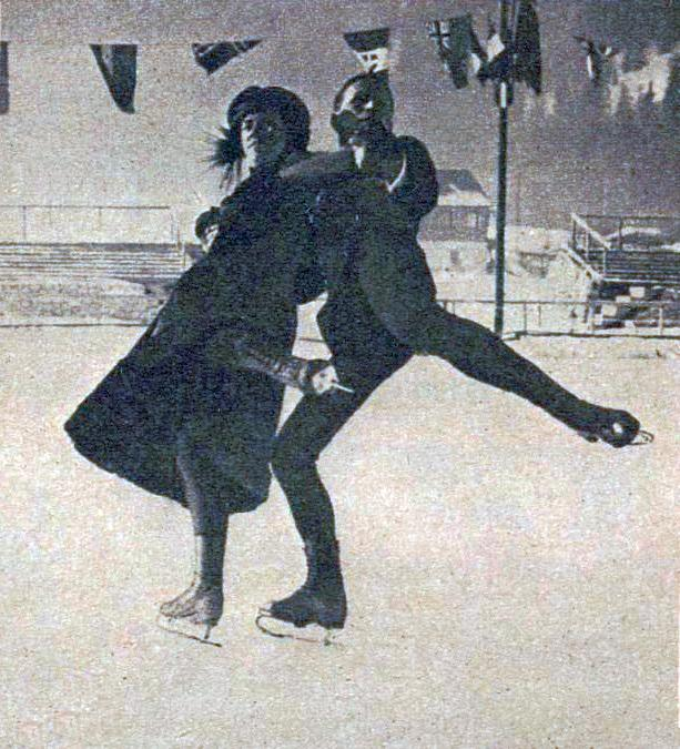 Ludowika et Walter Jakobsson, vice-champions olympiques de patinage en couple à Chamonix en 1924.